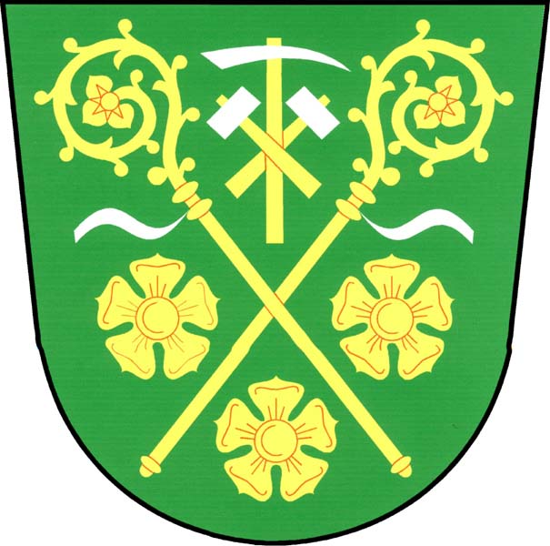 Znak obce Rudka